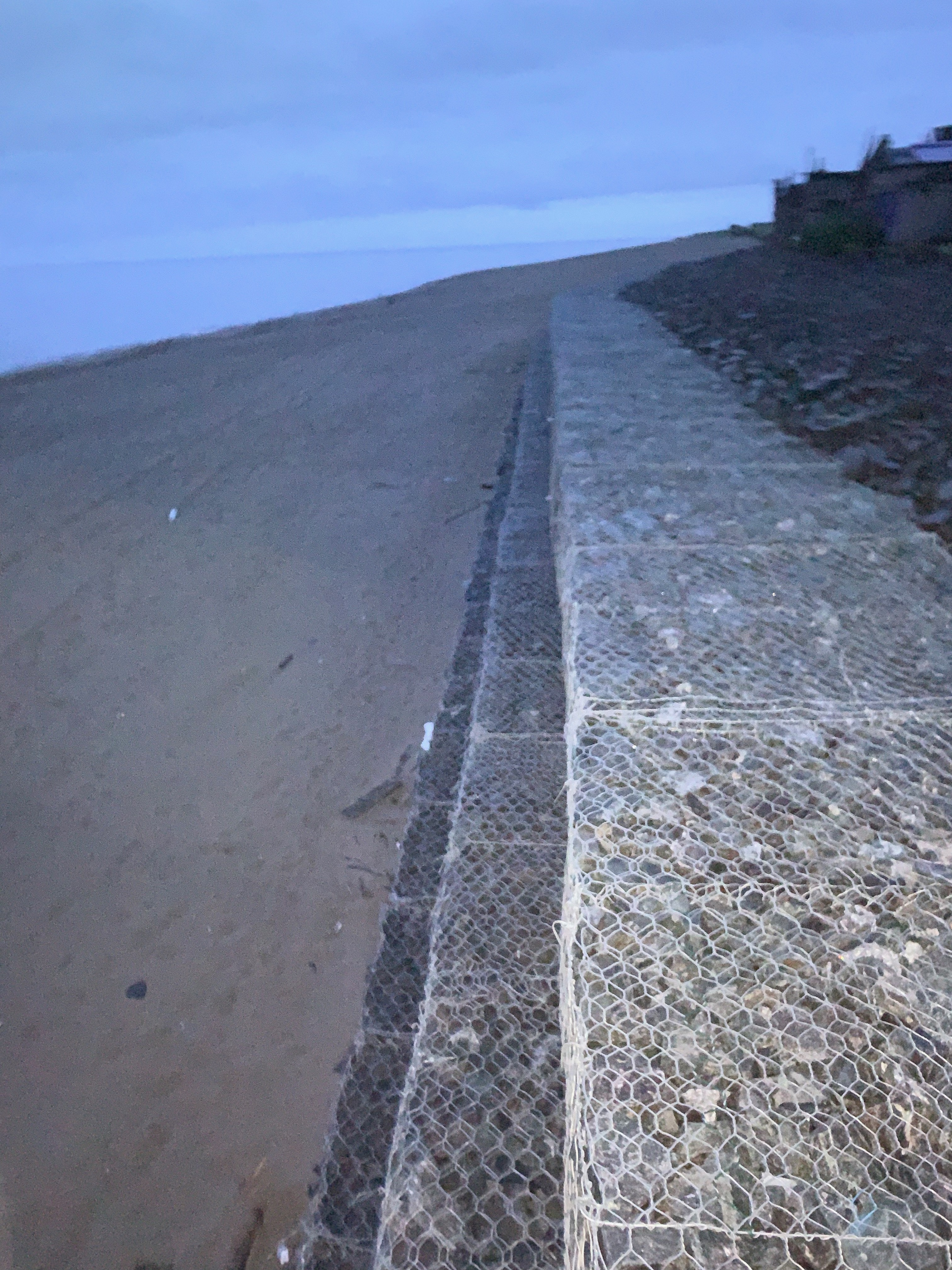 укрепление берега